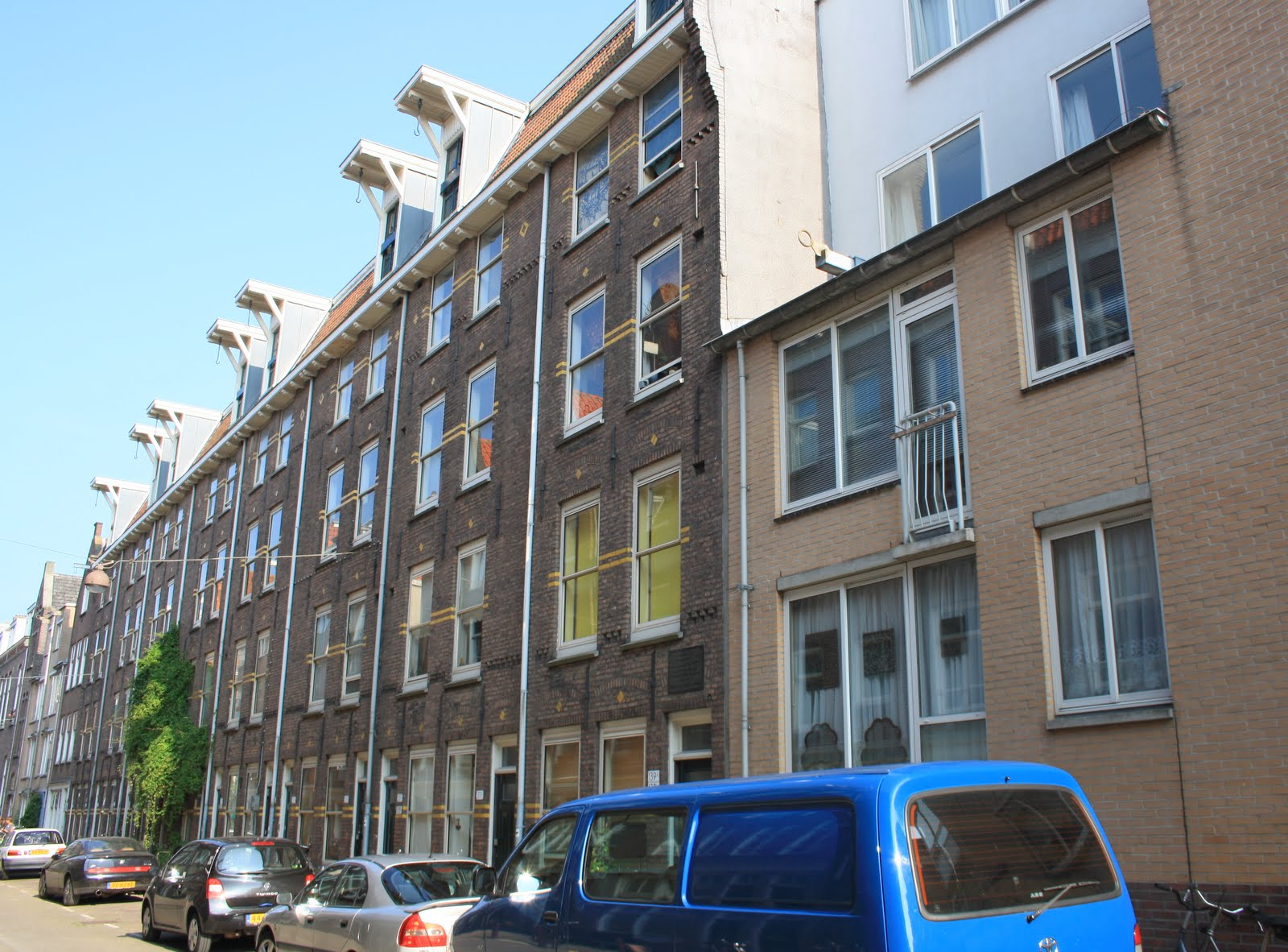 Goudsbloemstraat Amsterdam, gebouwd door Bouwonderneming Jordaan